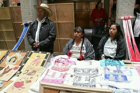 poblacion nahua de Ixtenco, Tlaxcala